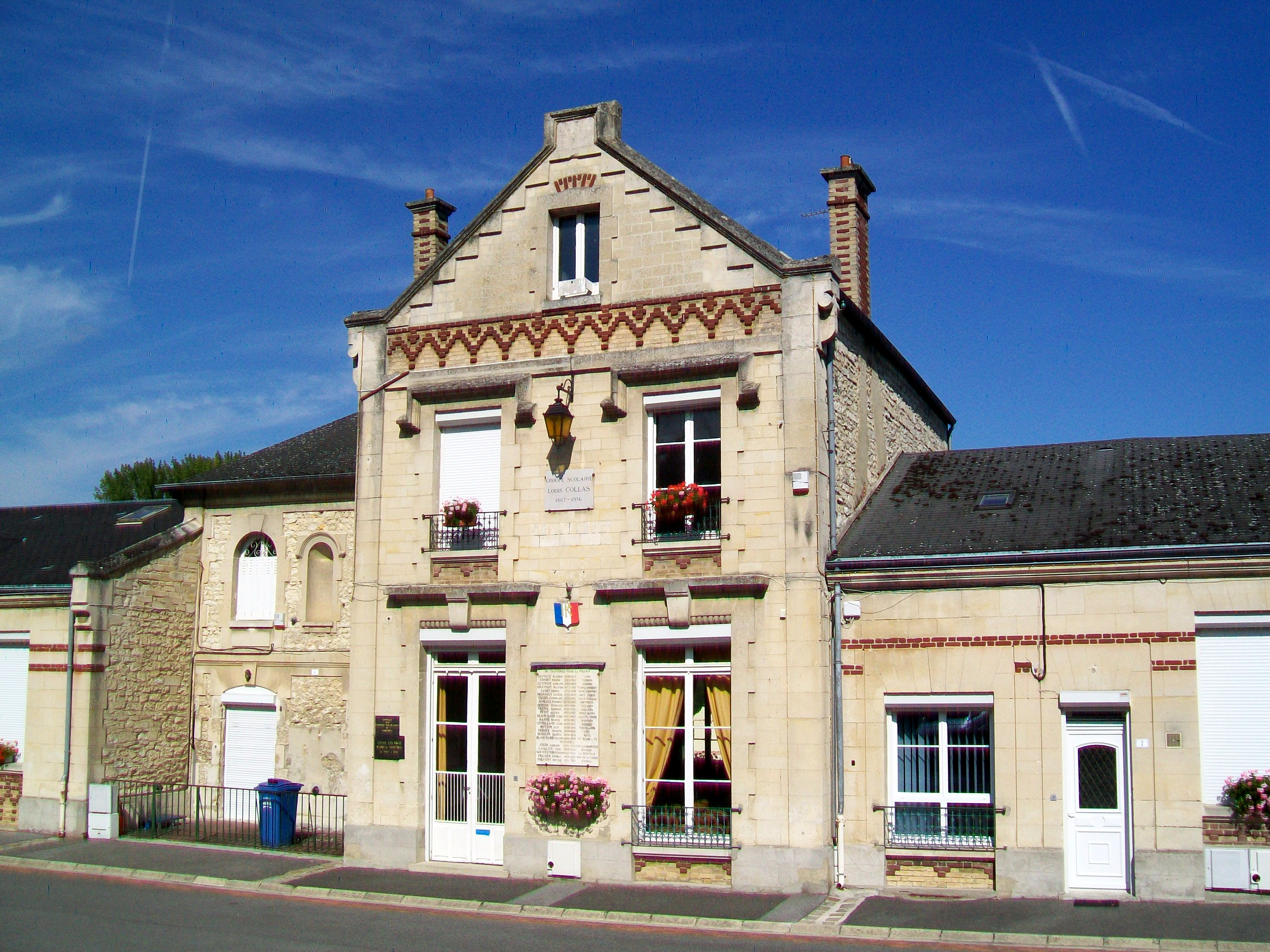 La mairie de Saintines, place Foch.